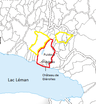 Étendue maximale de la mayorie/mairie de Chexbres (rouge) et terres de la famille de Palézieux (jaune).